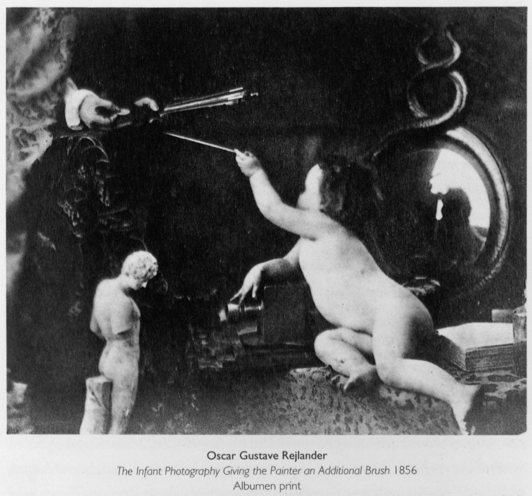 Fotografía de Oscar Rejlander